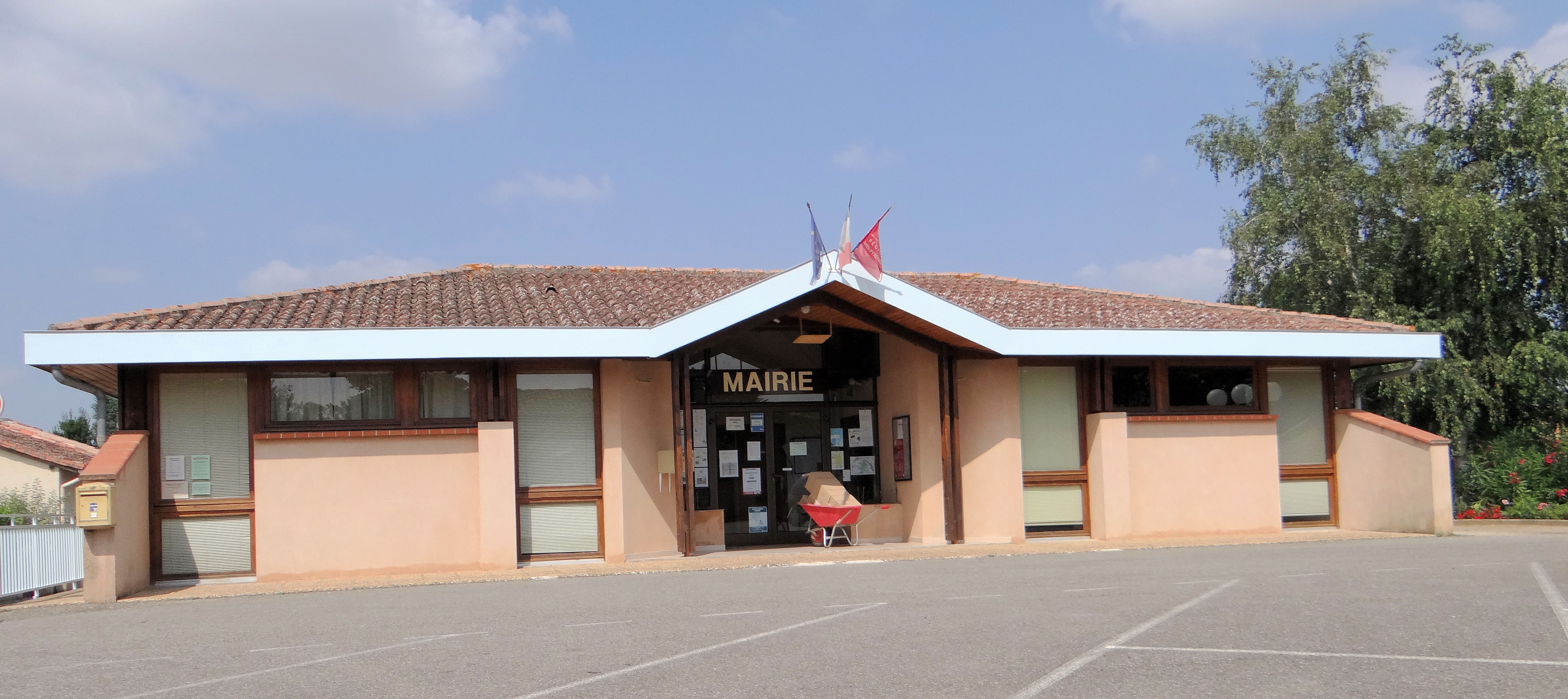 Castelferrus - Mairie